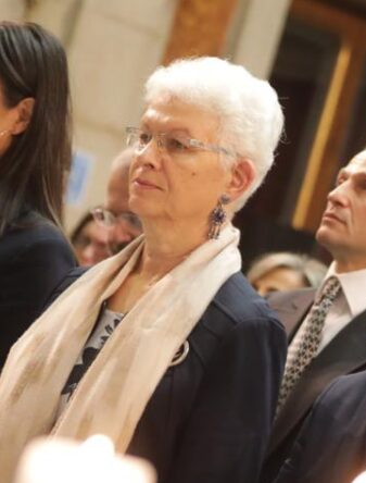 El alcalde de Madrid, José Luis Martínez-Almeida, y la vicealcaldesa, Begoña Villacís, han participado este mediodía en el acto organizado por el Ayuntamiento de Madrid con motivo del Día Oficial de la Memoria del Holocausto, en el que también han estado presentes los portavoces del resto de los grupos municipales y varios miembros de la corporación, además del exalcalde de Madrid, Alberto Ruiz Gallardón; la embajadora de Israel en Madrid, Rodica Radian-Gordon; el presidente de la Comunidad Judía, León Benelvas y el director general del Centro Sefarad Israel, Miguel de Lucas.